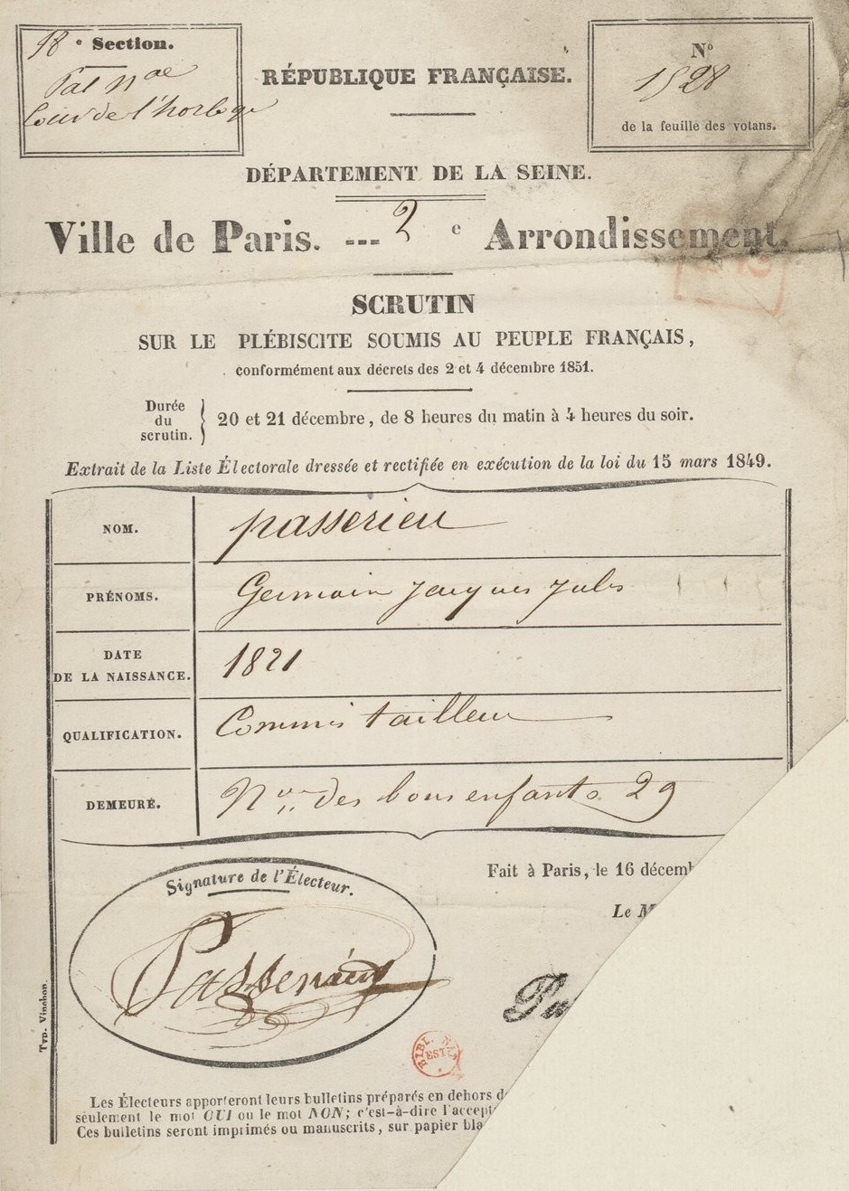 Carte d'électeur pour le scrutin sur le plébiscite soumis au peuple français conformément aux décrets des 2 et 4 décembre 1851, délivrée à Paris à Germain Jacques-Jules Passérieu, commis tailleur (2ème arrondissement).